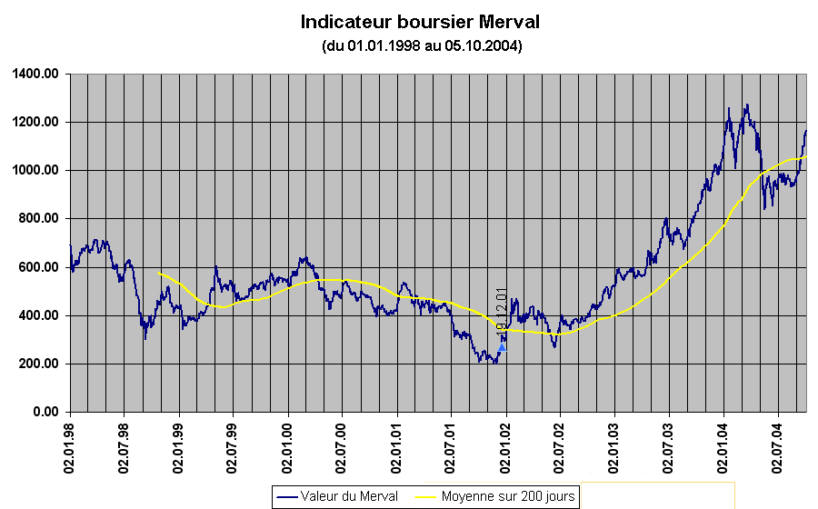 Évolution de l'indice boursier Merval entre le 01/01/1998 et le 5/10/2004